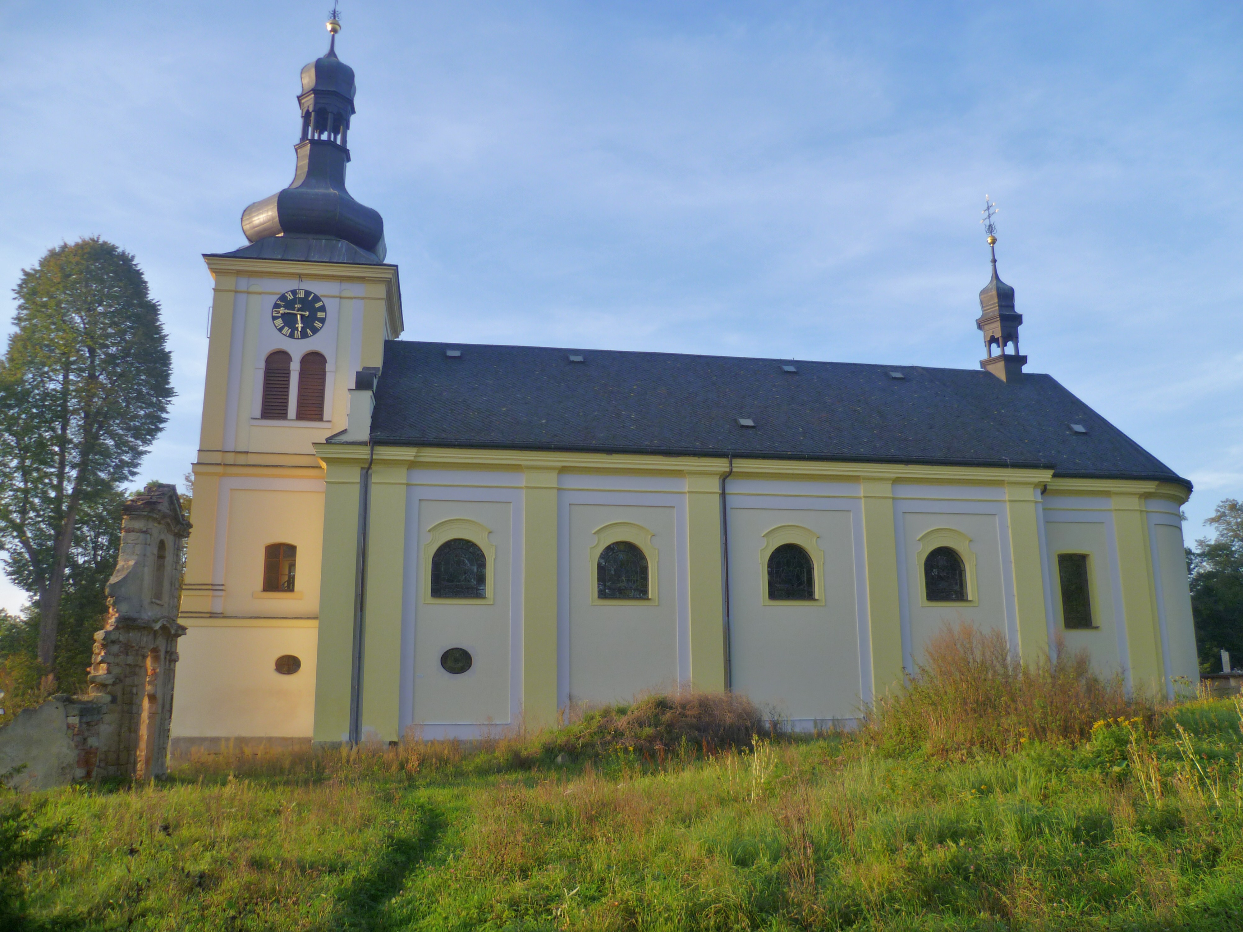 Kostel svatého Martina, Markvartice (okres Děčín).